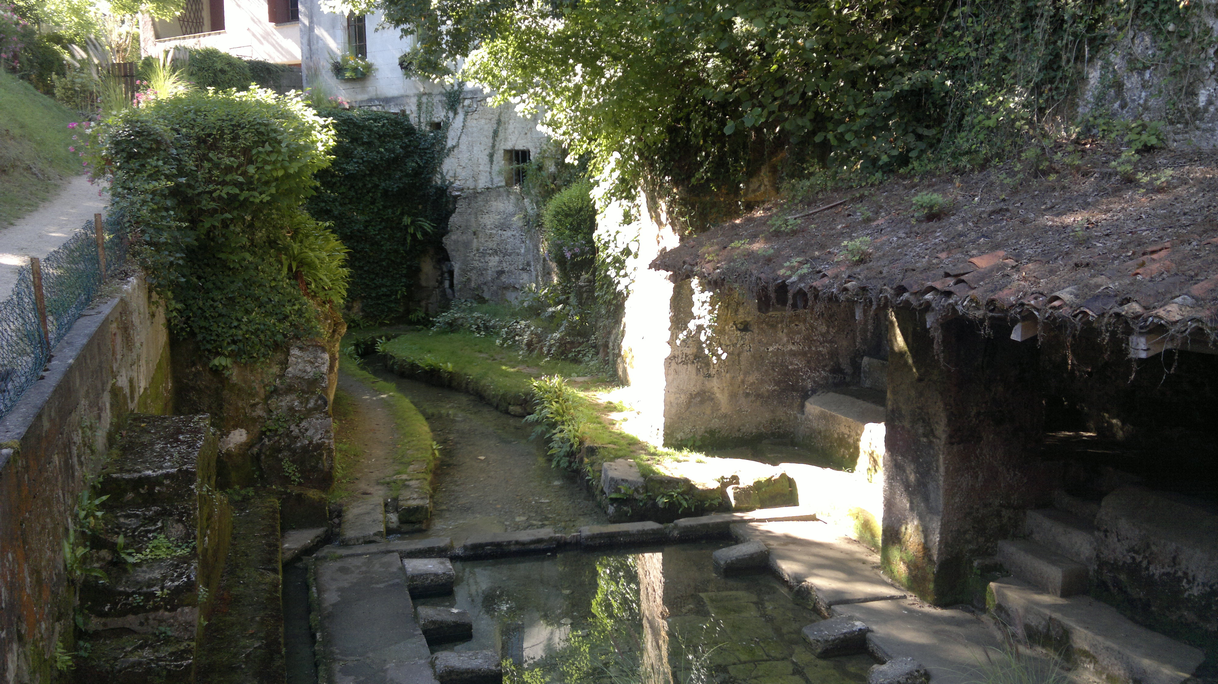 Lavoir du moulin, XIX°, Fr-17-Vénérand.